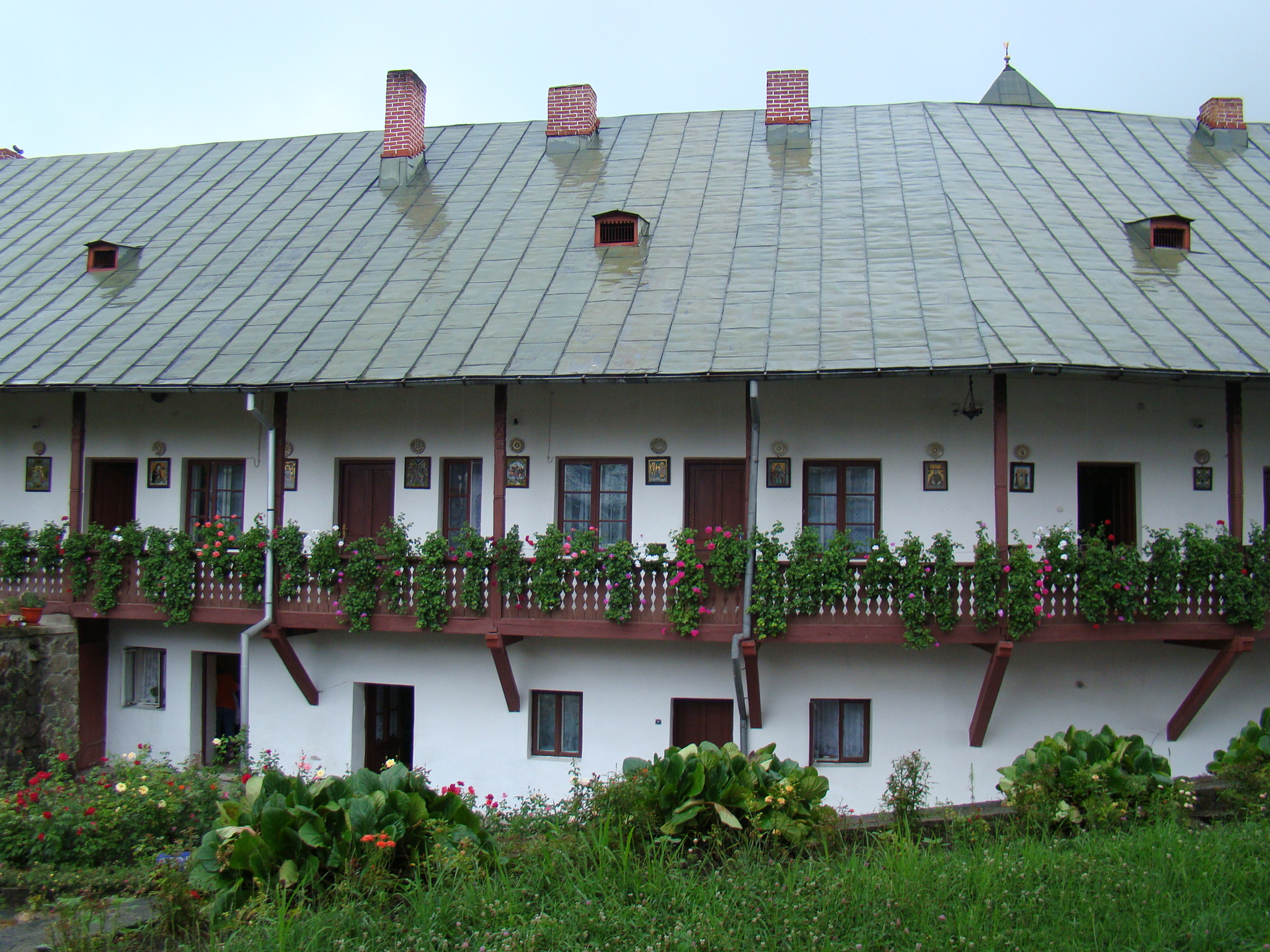 Manastirea Govora - Chilii 03